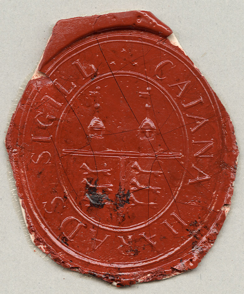 Kajaanin kihlakunnan vanha sinetti.